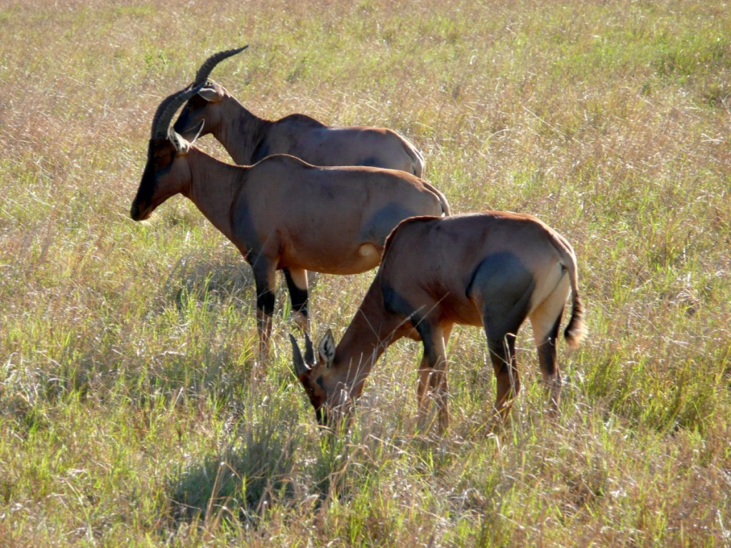 Topi au parc du massai mara